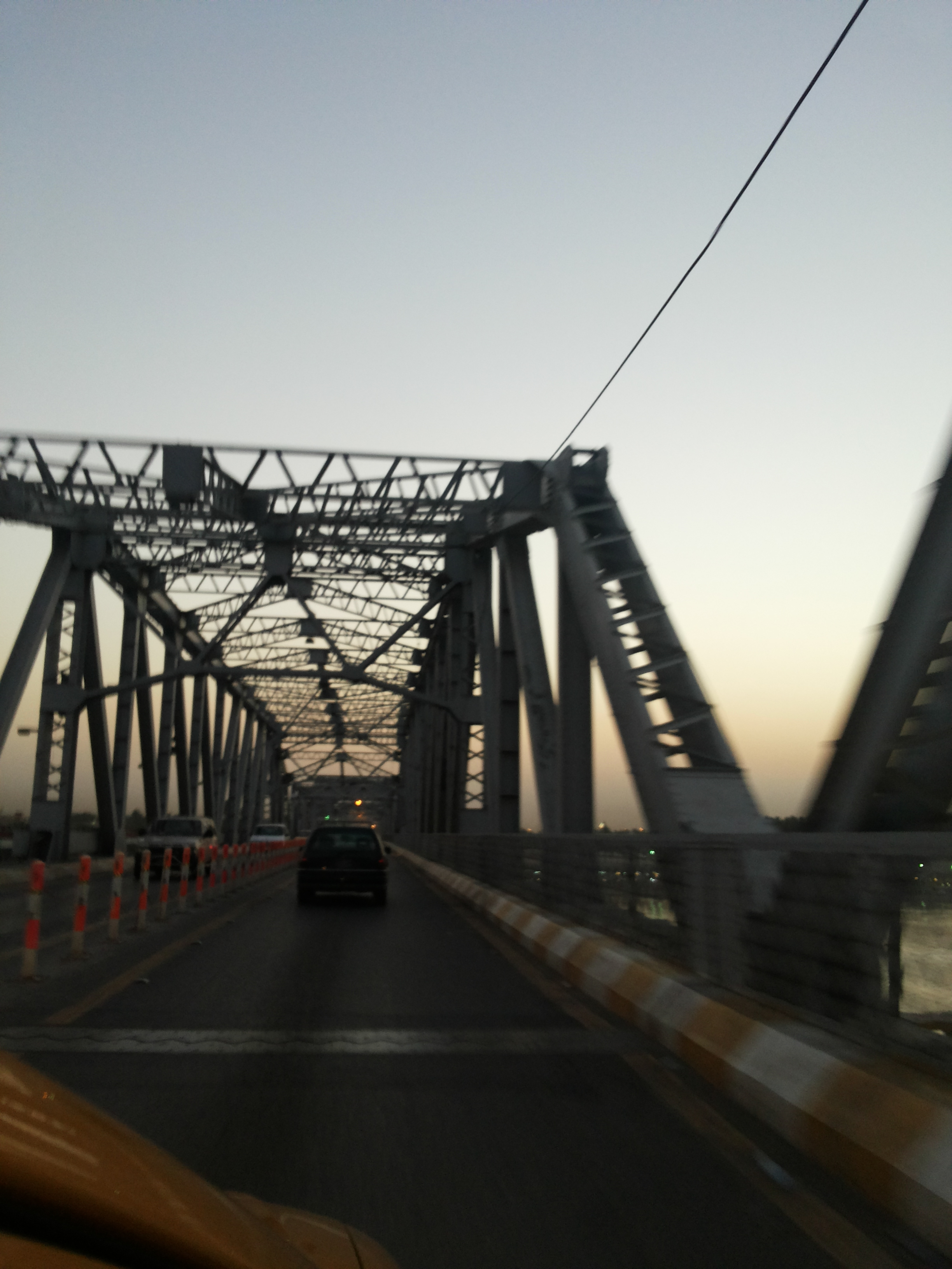 al-sarrafiya bridge in Baghdad